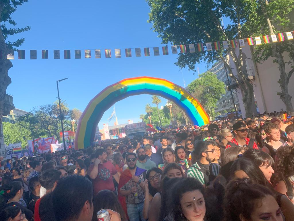 Fotografía tomada en la Marcha de orgullo LGBTIQ en la ciudad de Buenos Aires, Argentina.